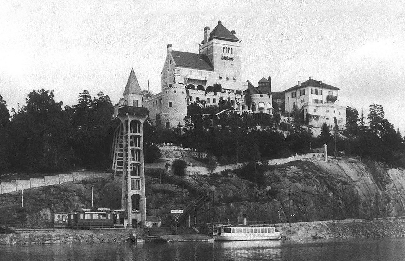 Villa Foresta på Herserudsklippan 1915 med el-driven hiss upp till Herserud.